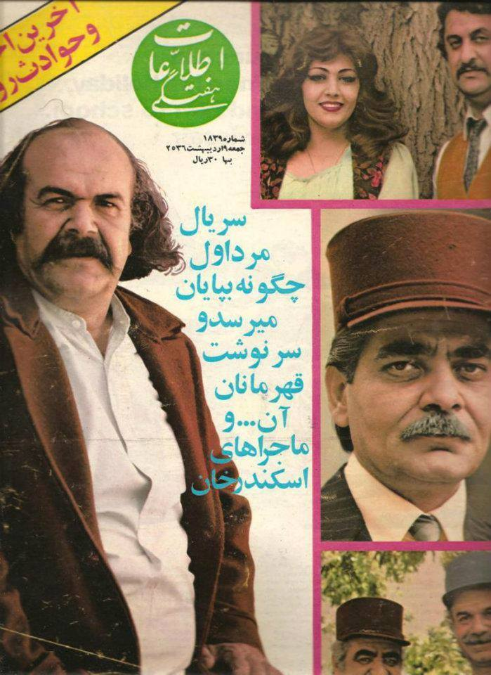 مرد اول (مجموعه تلویزیونی)